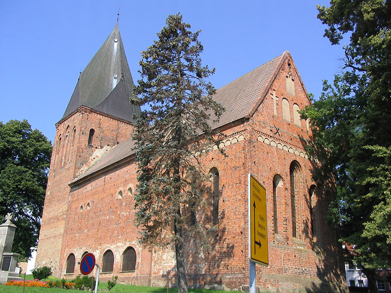 Beschreibung: Stadtkirche von Marlow, 1244 fertiggestellt, Turm aus dem 15. Jahrhundert Fotograf: Darkone, 31. Juli 2004